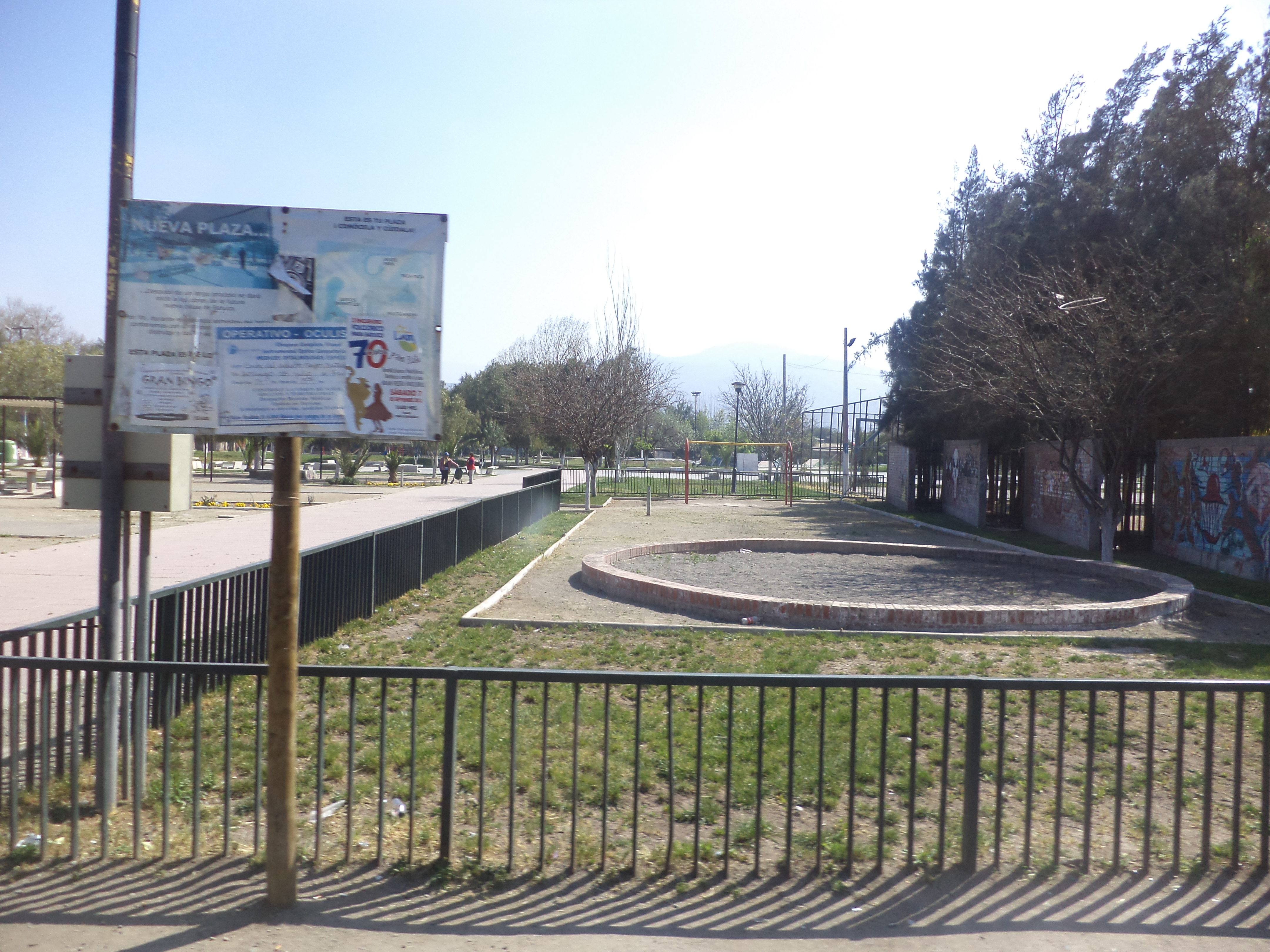 Plaza de Armas de Batuco, comuna de Lampa, provincia de Chacabuco, Chile